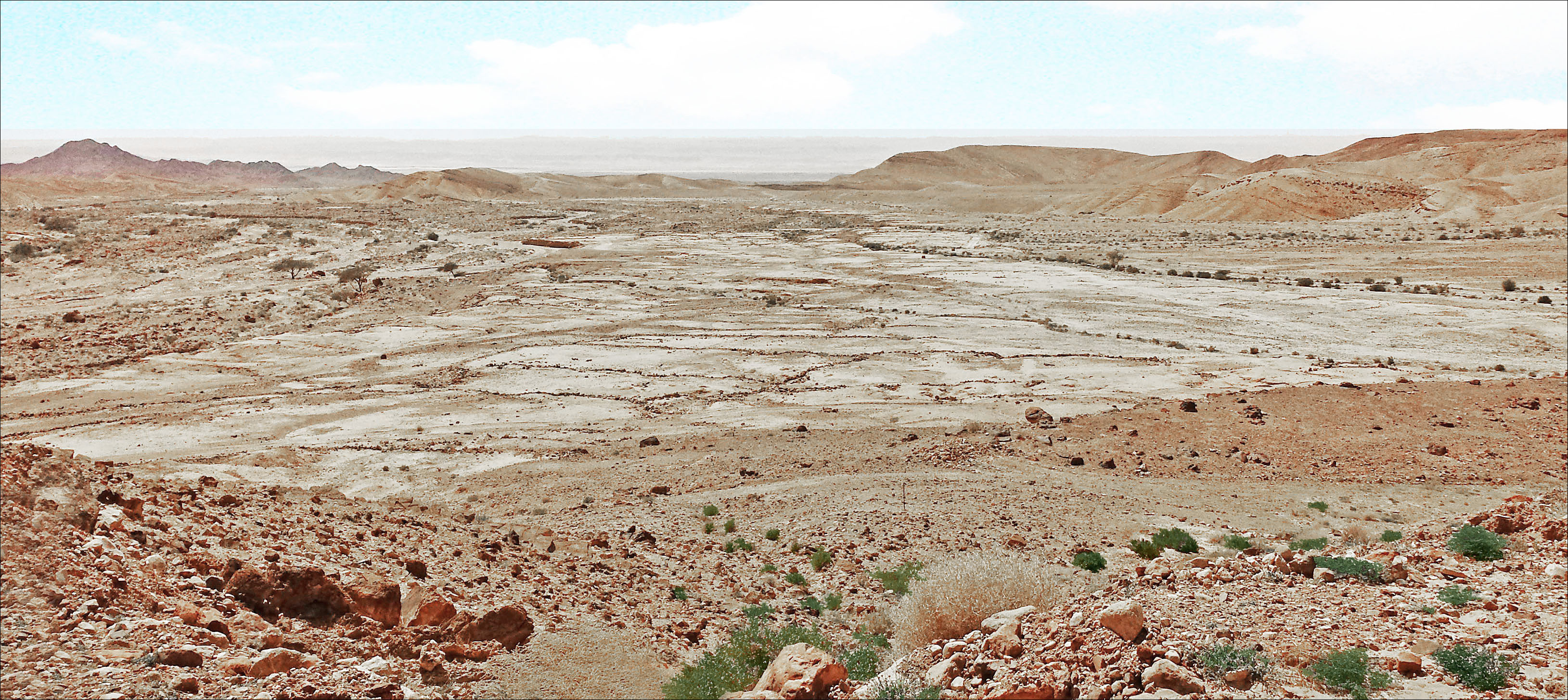 Champs cultivés près de Umm Rattam, avec murets et cavaillons ou billons.